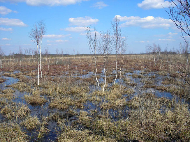 Черемський природний заповідник